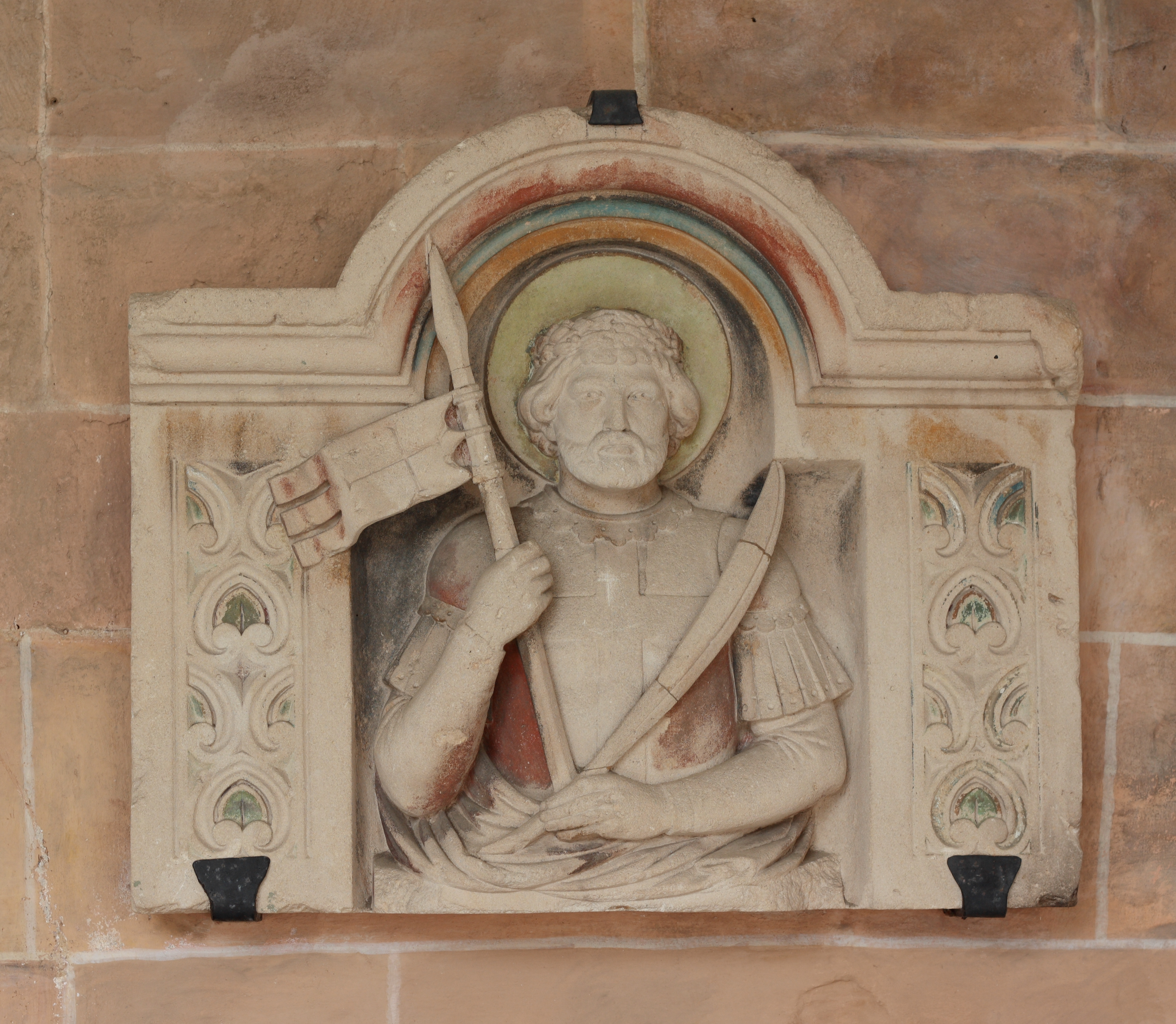 Relief des hl. Chrysanthus in der katholischen Pfarrkirche (Stiftskirche) St. Chrysanthus und Daria in Bad Münstereifel